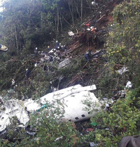 Labores de rescate de la Policía Nacional de Colombia al vuelo 2933 de LaMia, en área rural de La Unión (Antioquia).